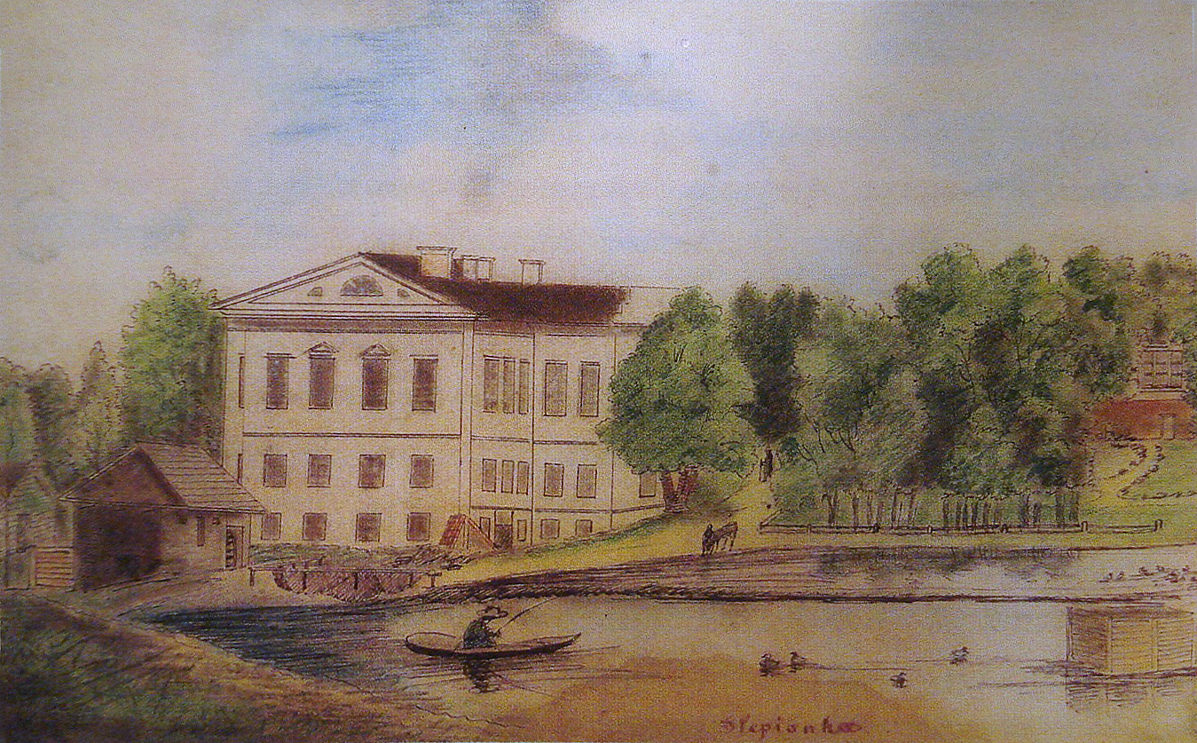 Беларуская (тарашкевіца): Менск (Miensk), Сьляпянка Вялікая (Ślapanka Vialikaja). Палац Ваньковічаў (Vańkovič)